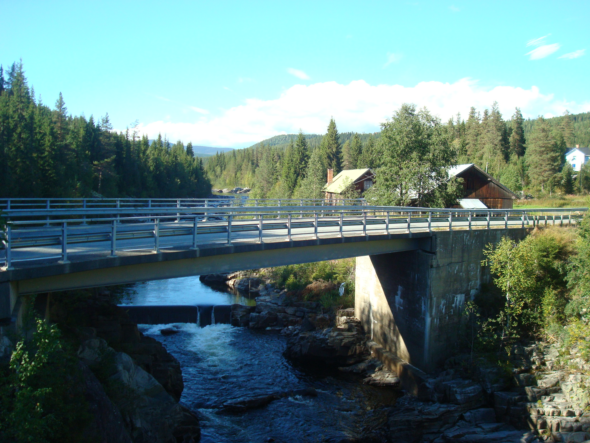 Nye Grønvold bru i Torpa.